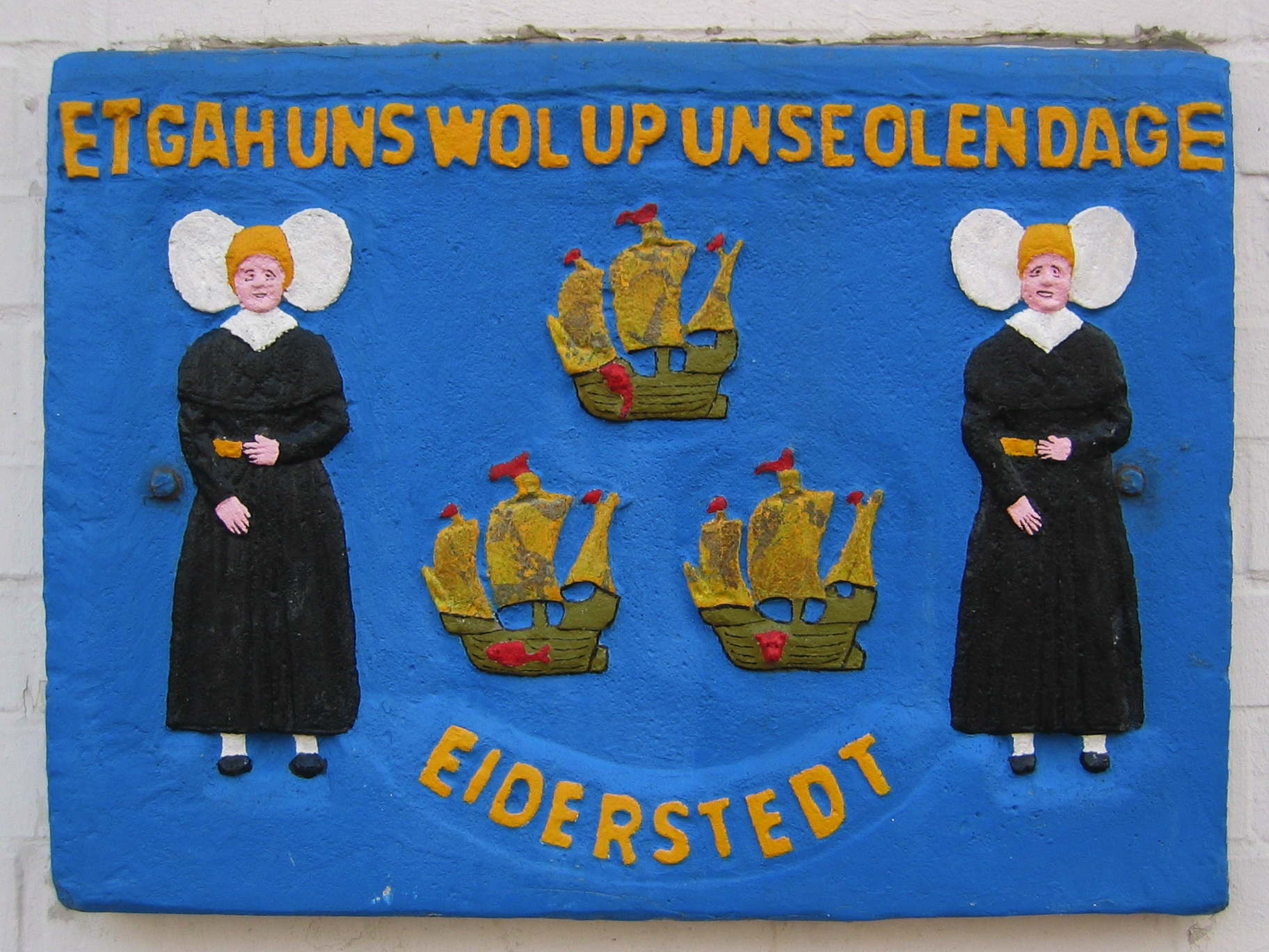 Hausverzierung in Sankt Peter-Ording, Dorf; gegenüber vom Heimatmuseum. – Die drei Schiffe sind Bestandteil des Wappens des ehemaligen Kreises Eiderstedt. Die beiden abgebildeten Frauen tragen Eiderstedter Tracht. Der Trinkspruch „Et gah uns wol up unse olen dage“ (Es gehe uns wohl auf unsere alten Tage) wird Martje Flohr zugeschrieben, die ihn im Alter von 10 Jahren während der Belagerung Tönnings 1700 vor einer Gruppe feindlicher Offiziere ausgebracht haben soll.